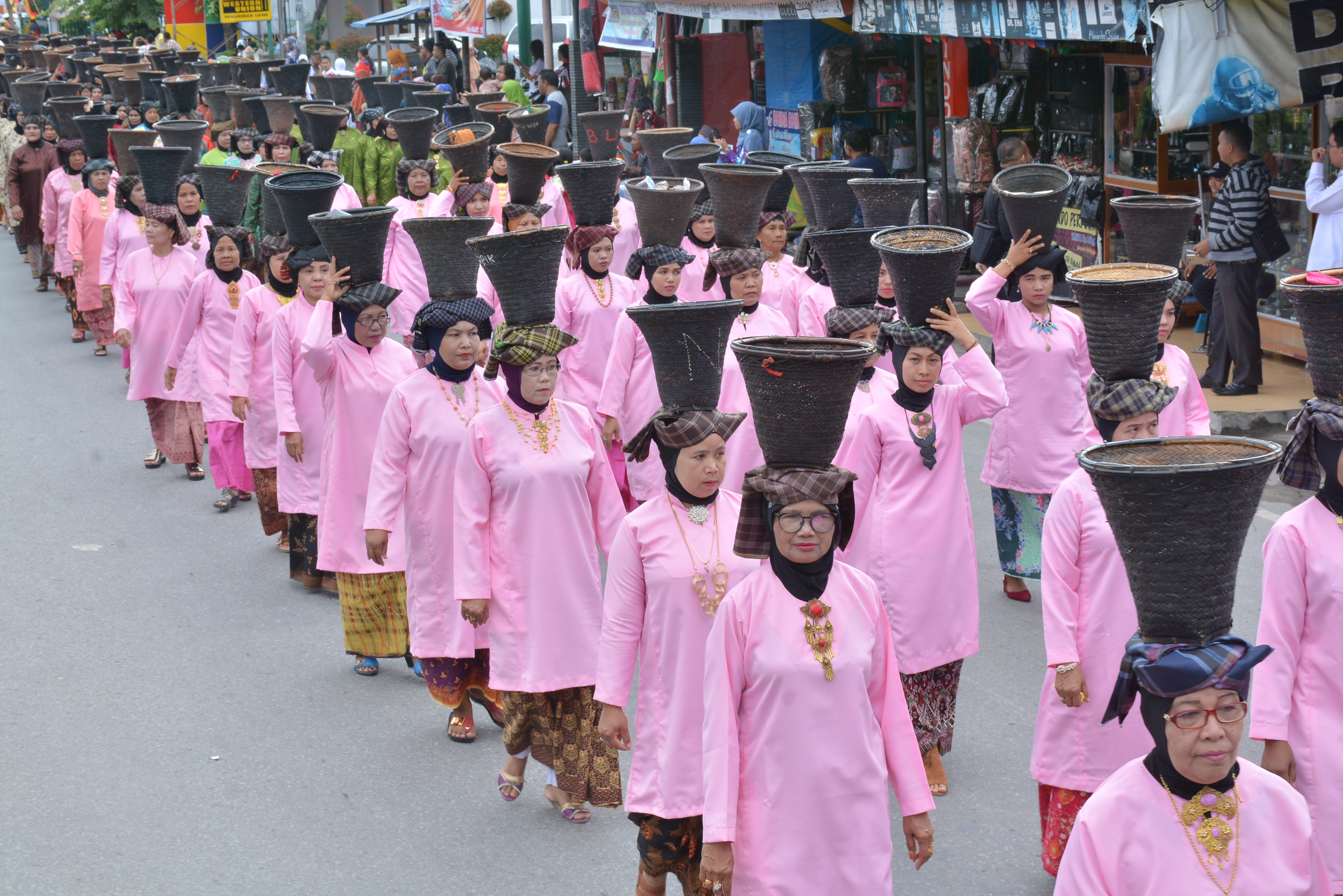 Arak Bako